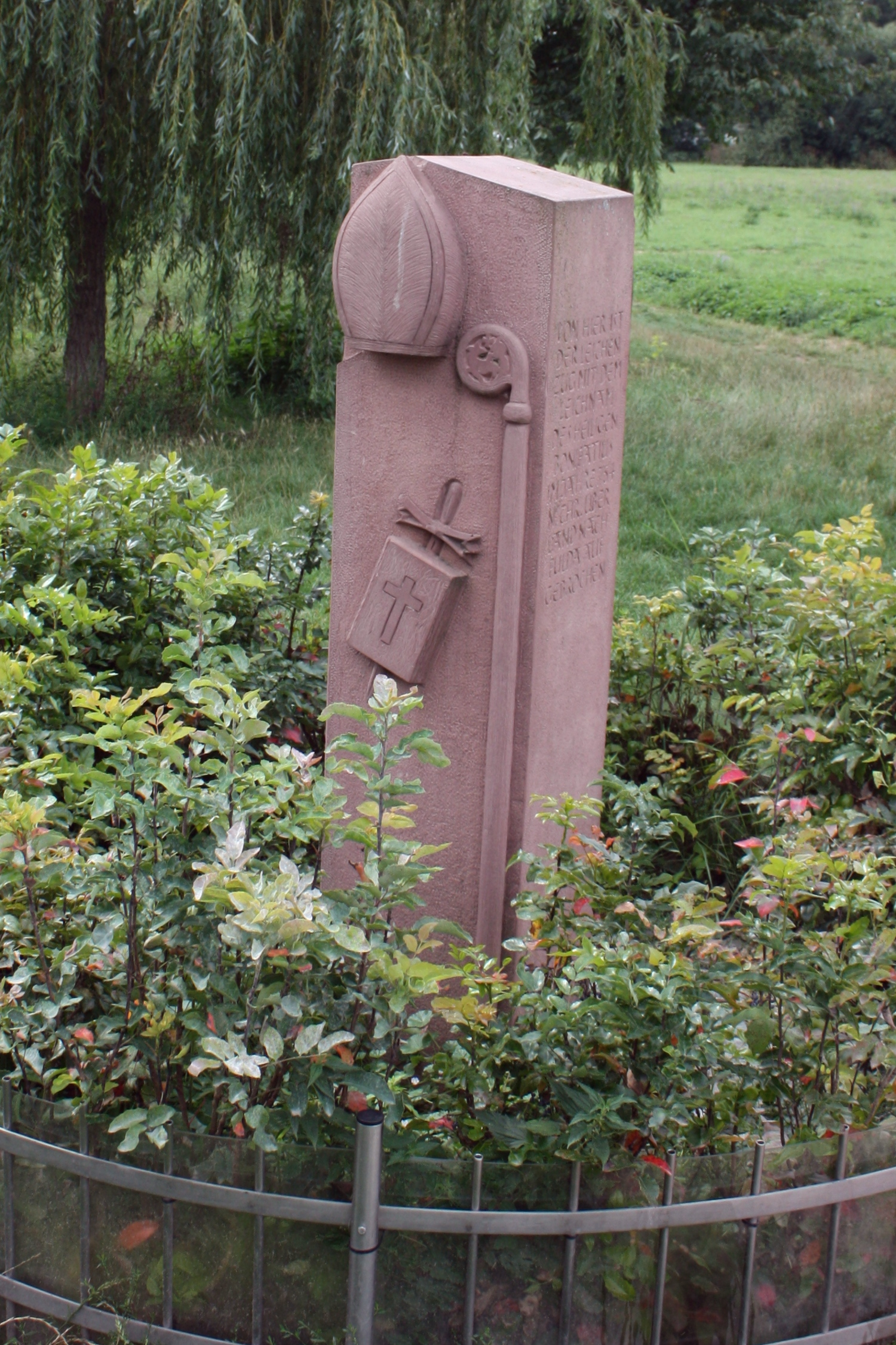 Hochheim, Hessen: Denkmal für Bonifatius am Rheim